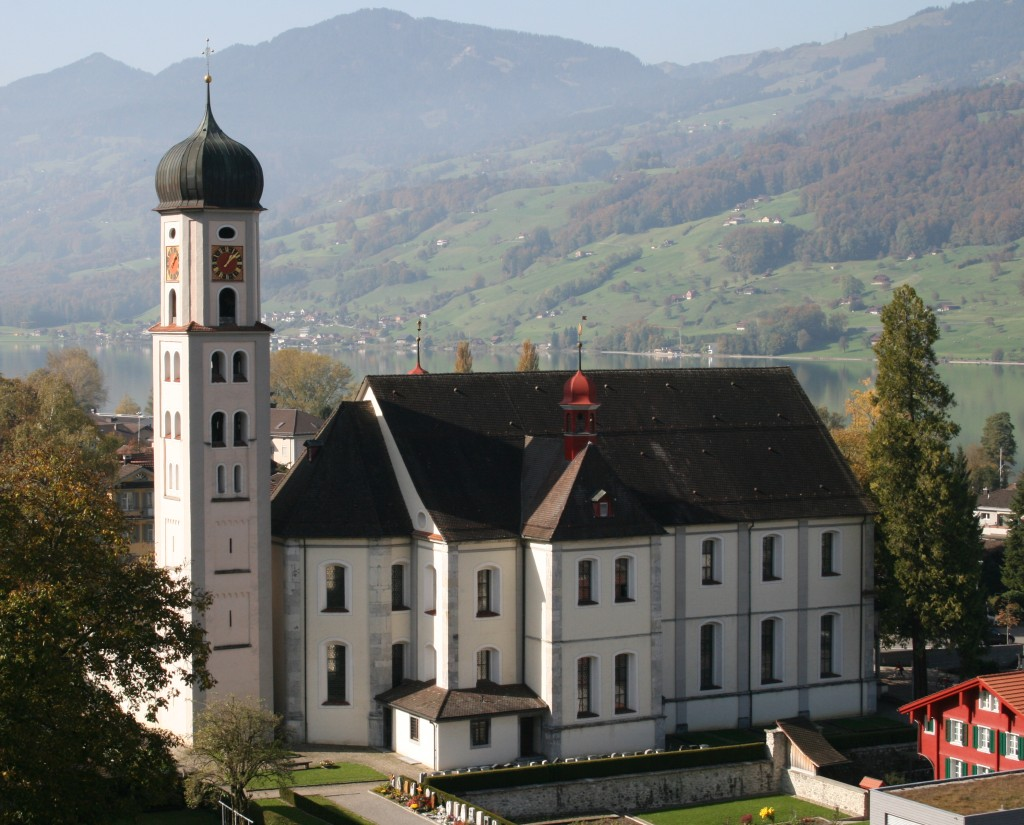 Pfarr- und Wallfahrtskirche Sachseln, Schweiz, Gesamtansicht